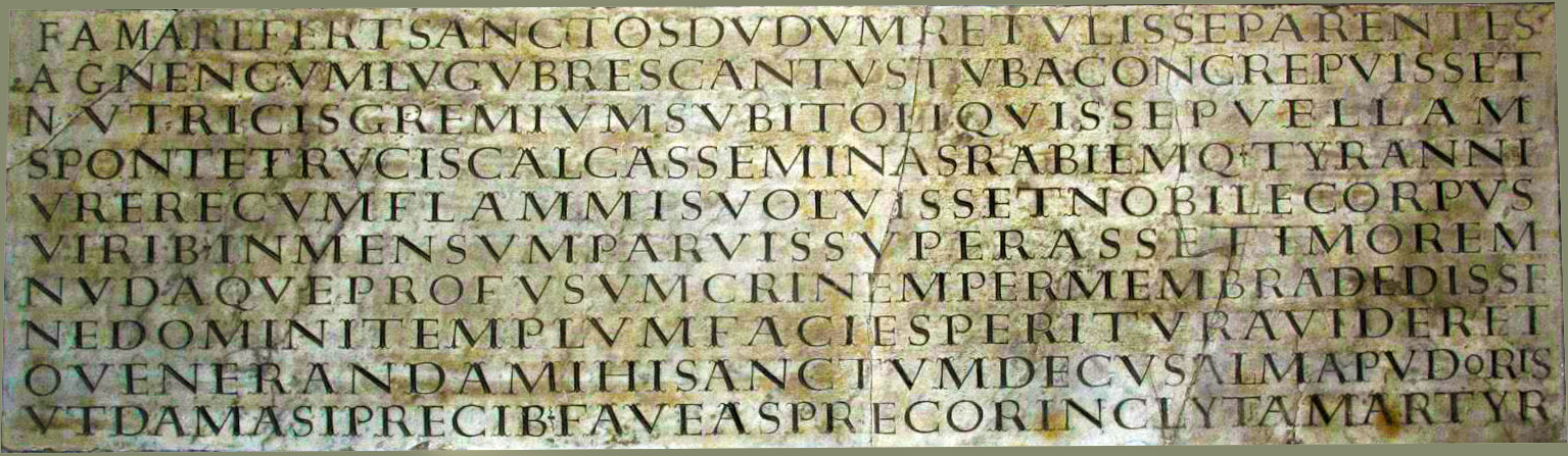 Fac-similé d'une épigramme monumentale de Damase Ier gravée par le lapicide Filocalus, fin IVe s., Rome, basilique Sant'Agnese fuori le Mura